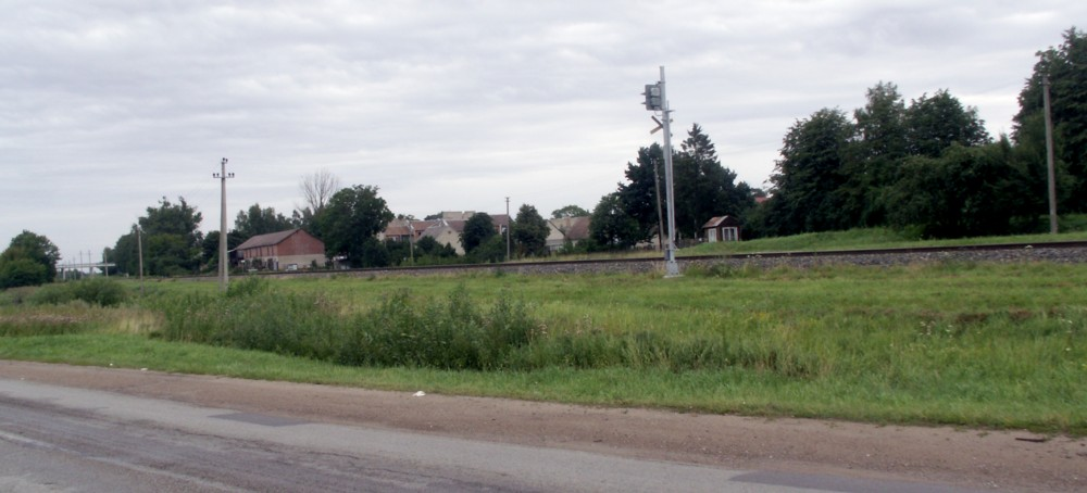 Sutkūnai